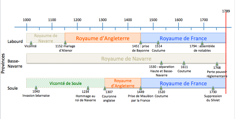 Frise chronologique des événements marquants concernant les trois provinces du Pays basque français avant 1789